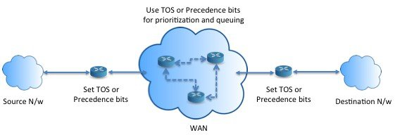 Монгол: Зураг2